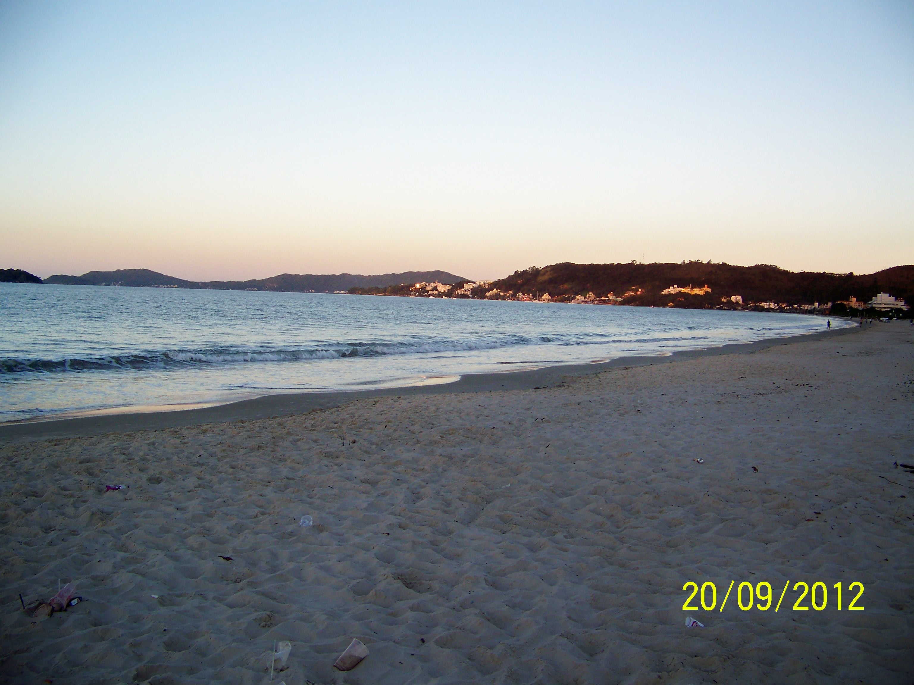 La praia Jurerê en Florianópolis, Brasil.